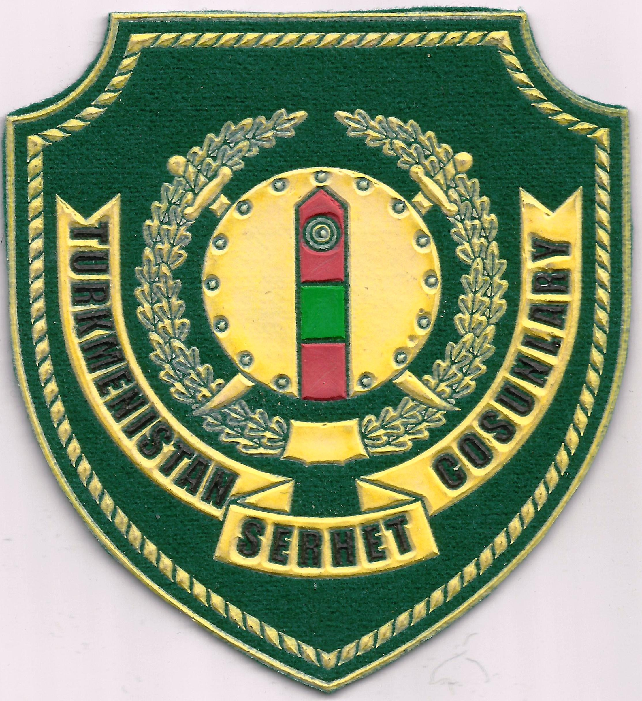 Turkmenistan Border Troops patch